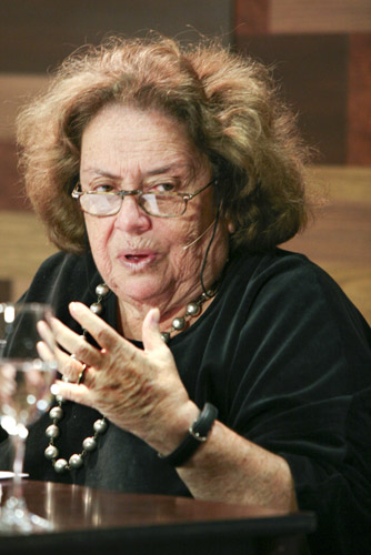 Café Filosófico com o tema "Sonhos de meninos". Foto: Damião A. Francisco